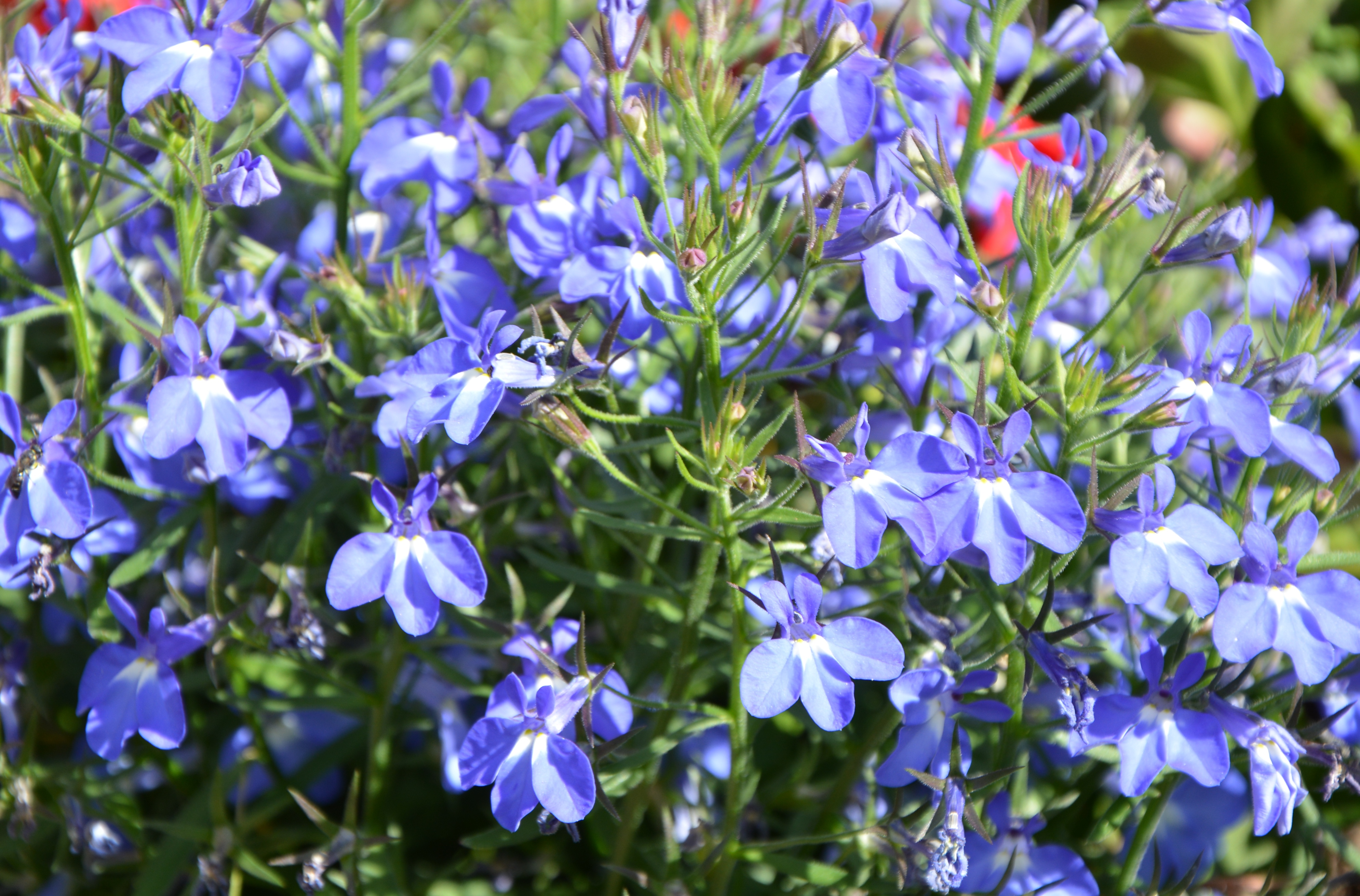 Blå lobelia